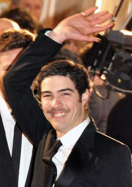 Tahar Rahim à la cérémonie des Césars 2010